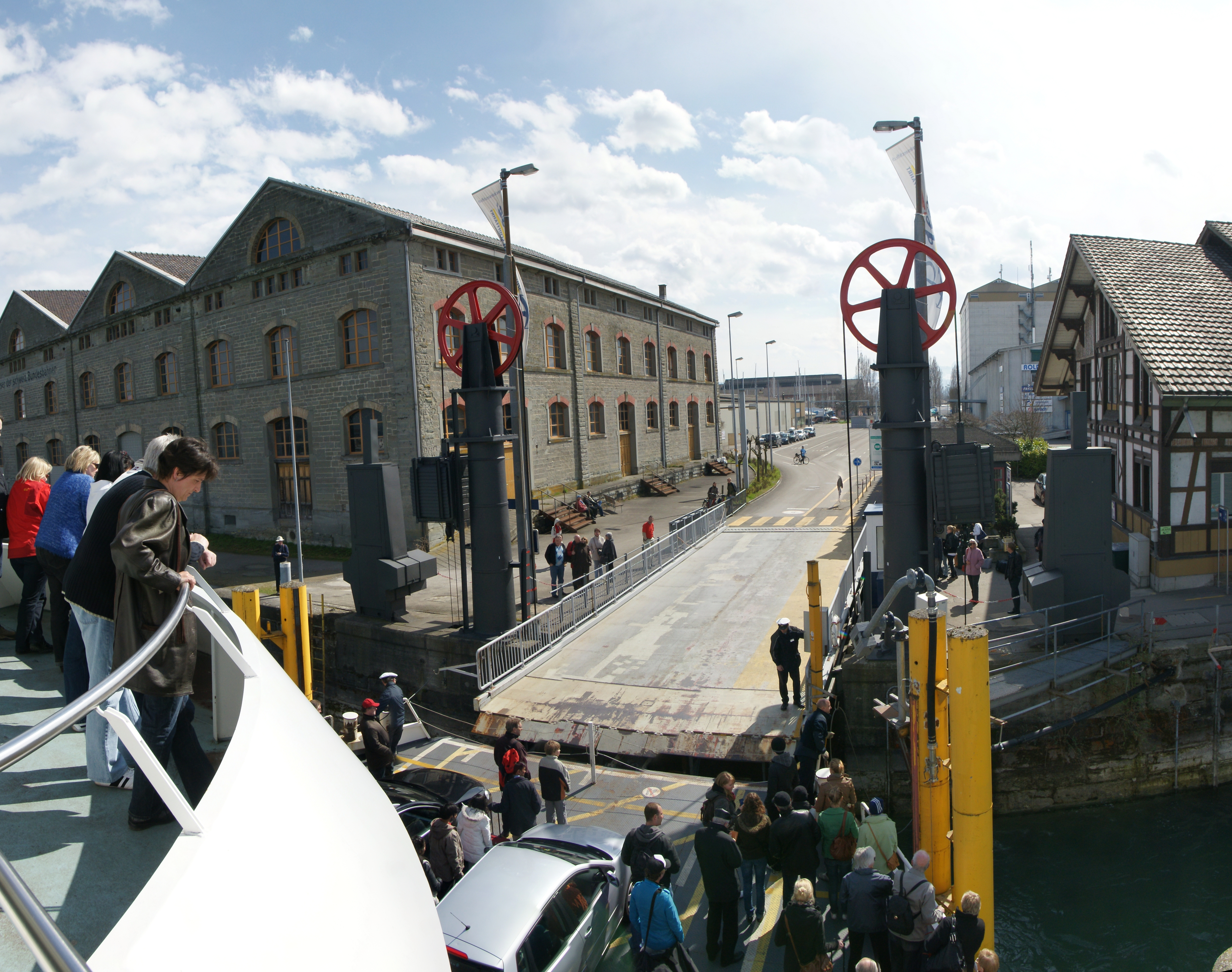 Landungsbrücke der Autofähre im Hafen von Romanshorn.